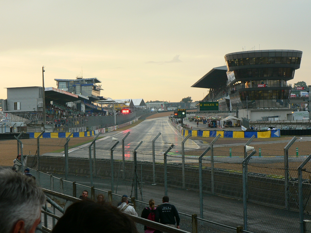 Description: Circuit Bugatti before the 24 heures du mans 2006 - Le mans (France) Date: 14 june 2006 Photographer/illustrator: Eyone Uploader: Eyone